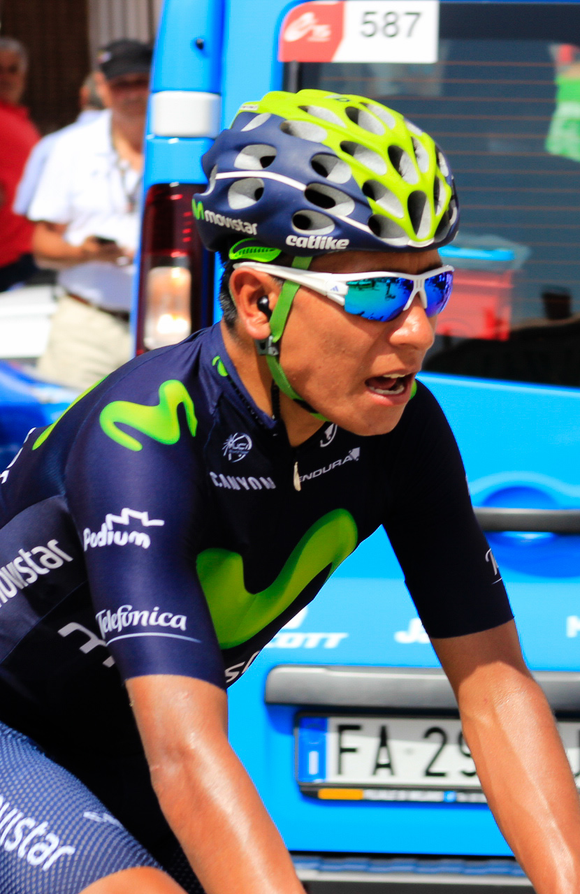 Vuelta a España 2015 | 8ª Etapa Puebla de Don Fadrique - Murcia-27